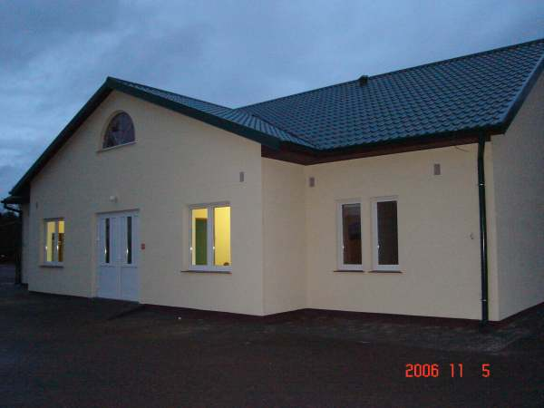 Budynek aktywności kulturalno sportowej w Redle